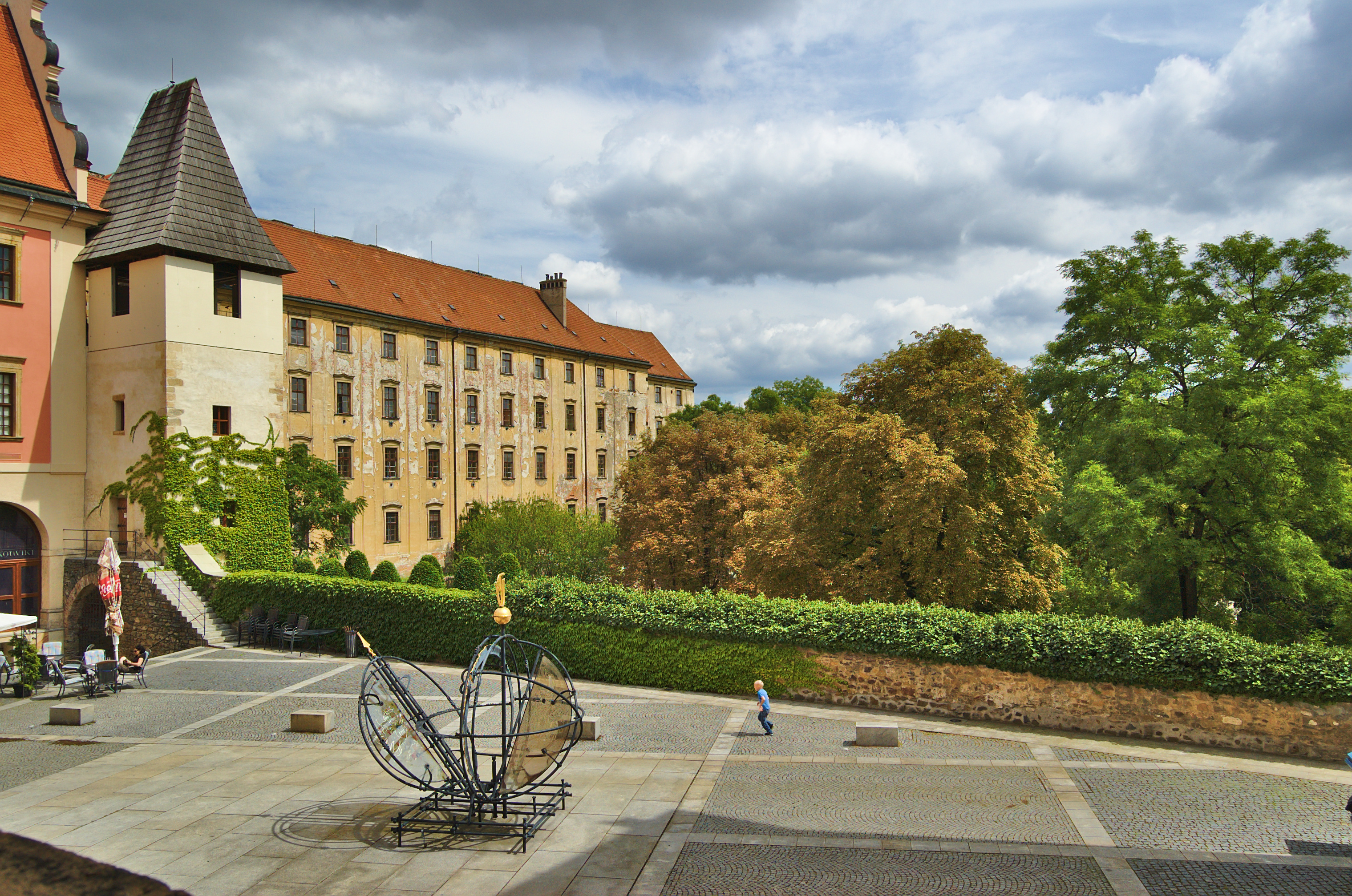 Bývalý jezuitský konvikt se Židovskou bránou, Olomouc